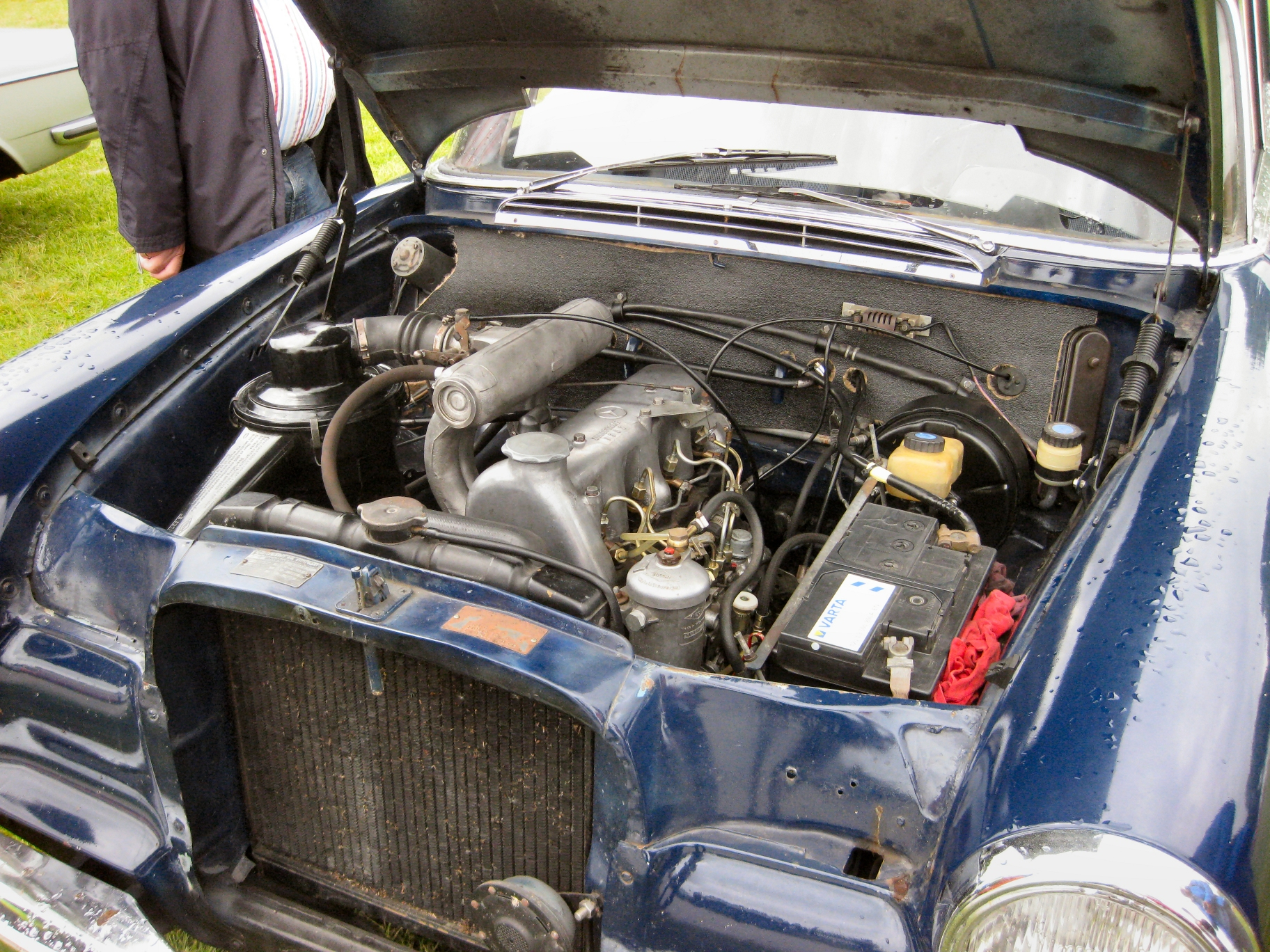 Motorraum MB W110 200D